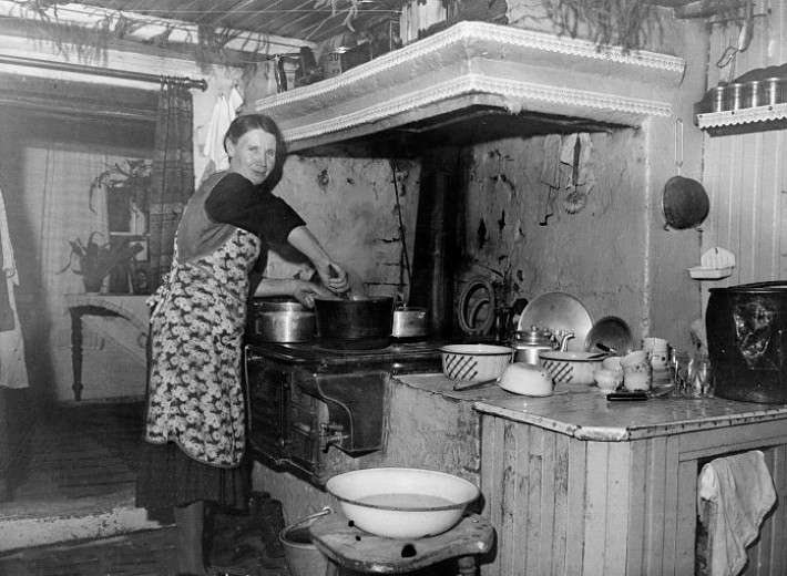 Torpet Kästadal, Augusta Bogstedt i köket